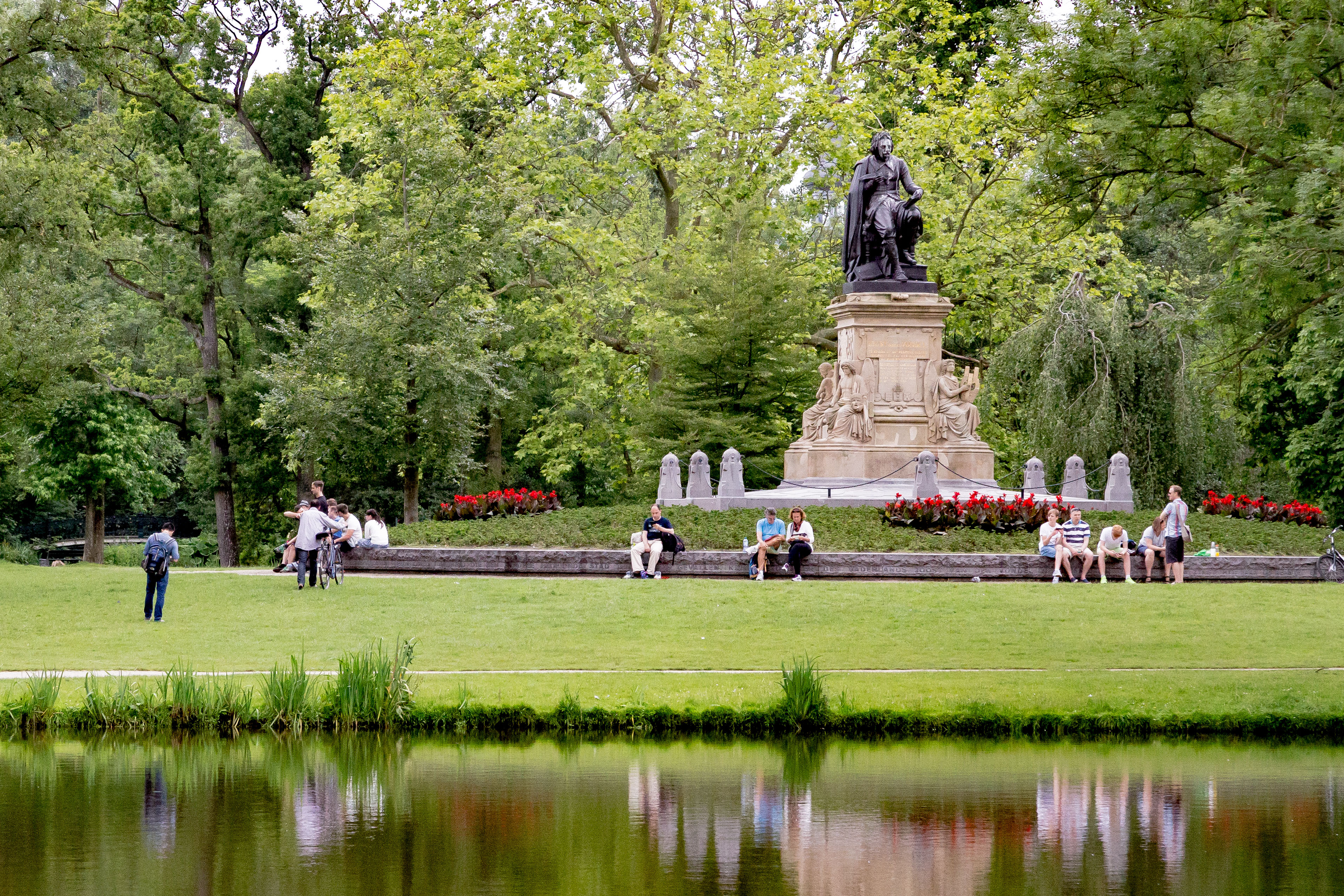 Statue von Joost Van den Vondel im Vondelpark